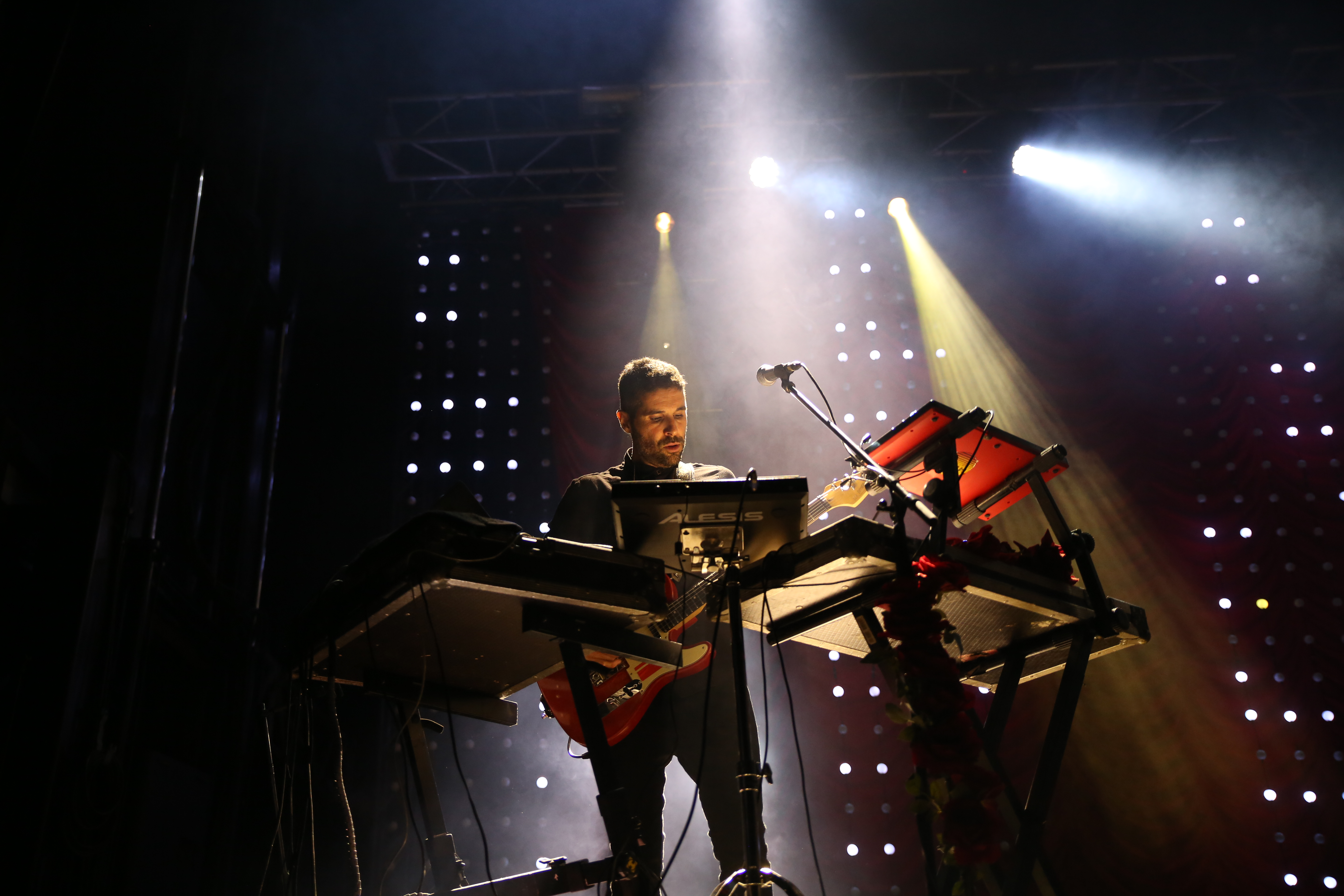 El dúo Fuel Fandango en el festival Palencia Sonora 2017.